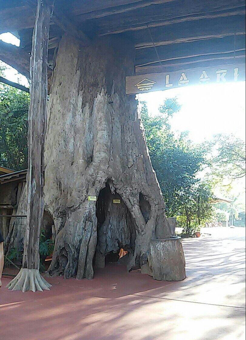 Entrada del Emprendimiento familiar " La Aripuca" con un árbol hueco de aproximadamente 100 años de Edad . Este tronco fue rescatado de la selva y utilizado como sostén de una parte del techo de la entrada. Entrada " La Aripuca"